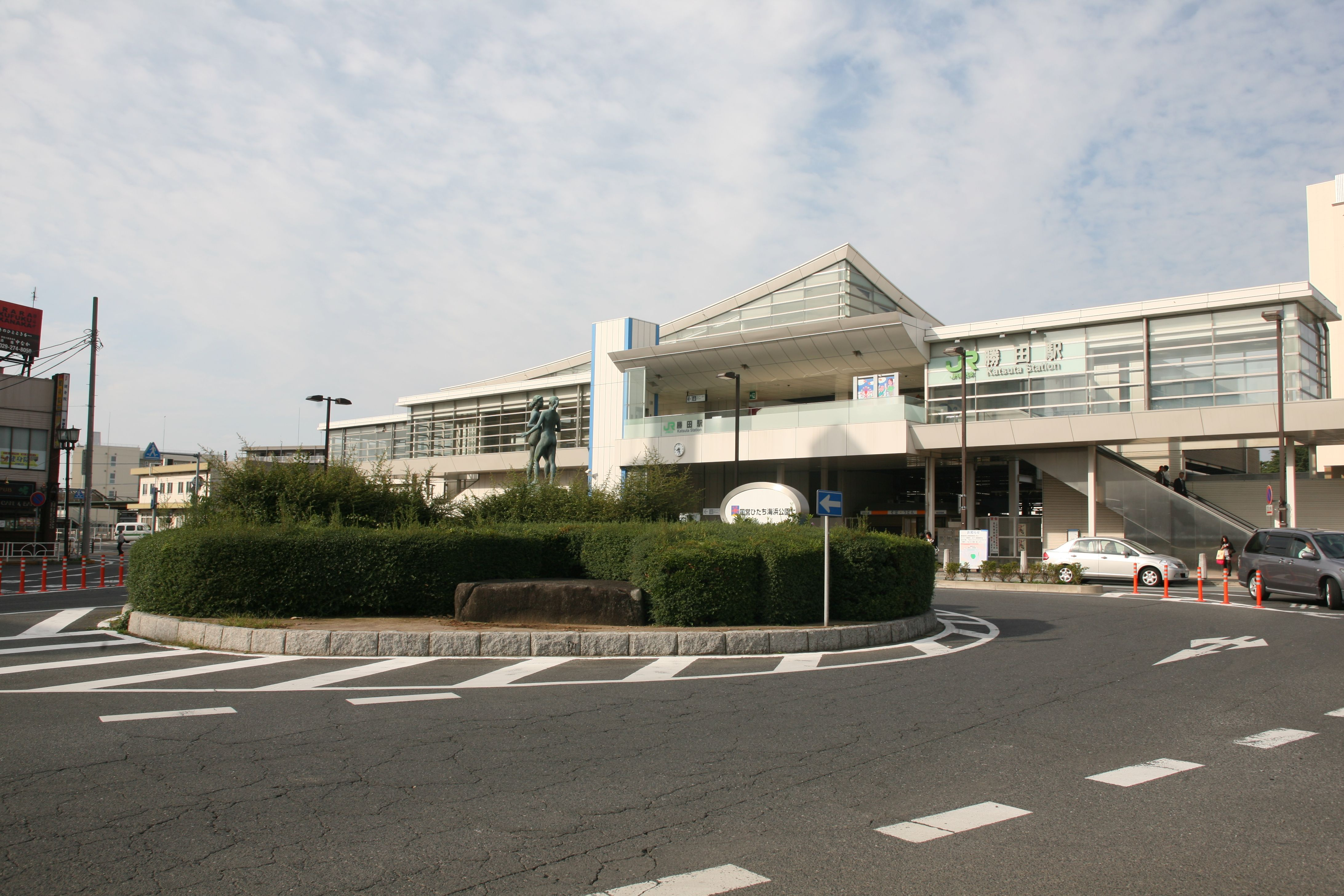 勝田駅